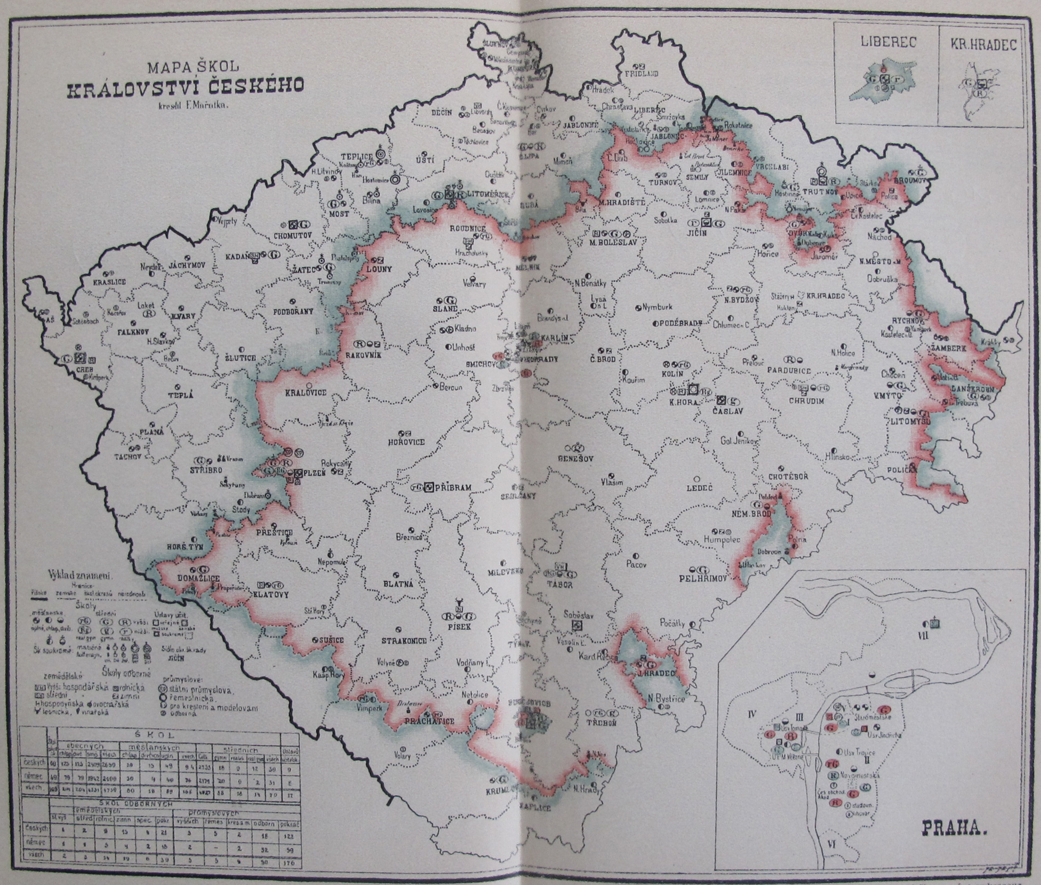 Mapa škol království českého kreslil F. Mařatka.